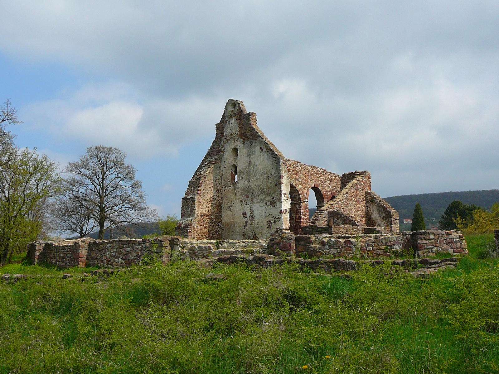 Ecsérpusztai templomrom (Kővágóörs, Ecséri szőlőhegy) This is a photo of a monument in Hungary. Identifier: 9939